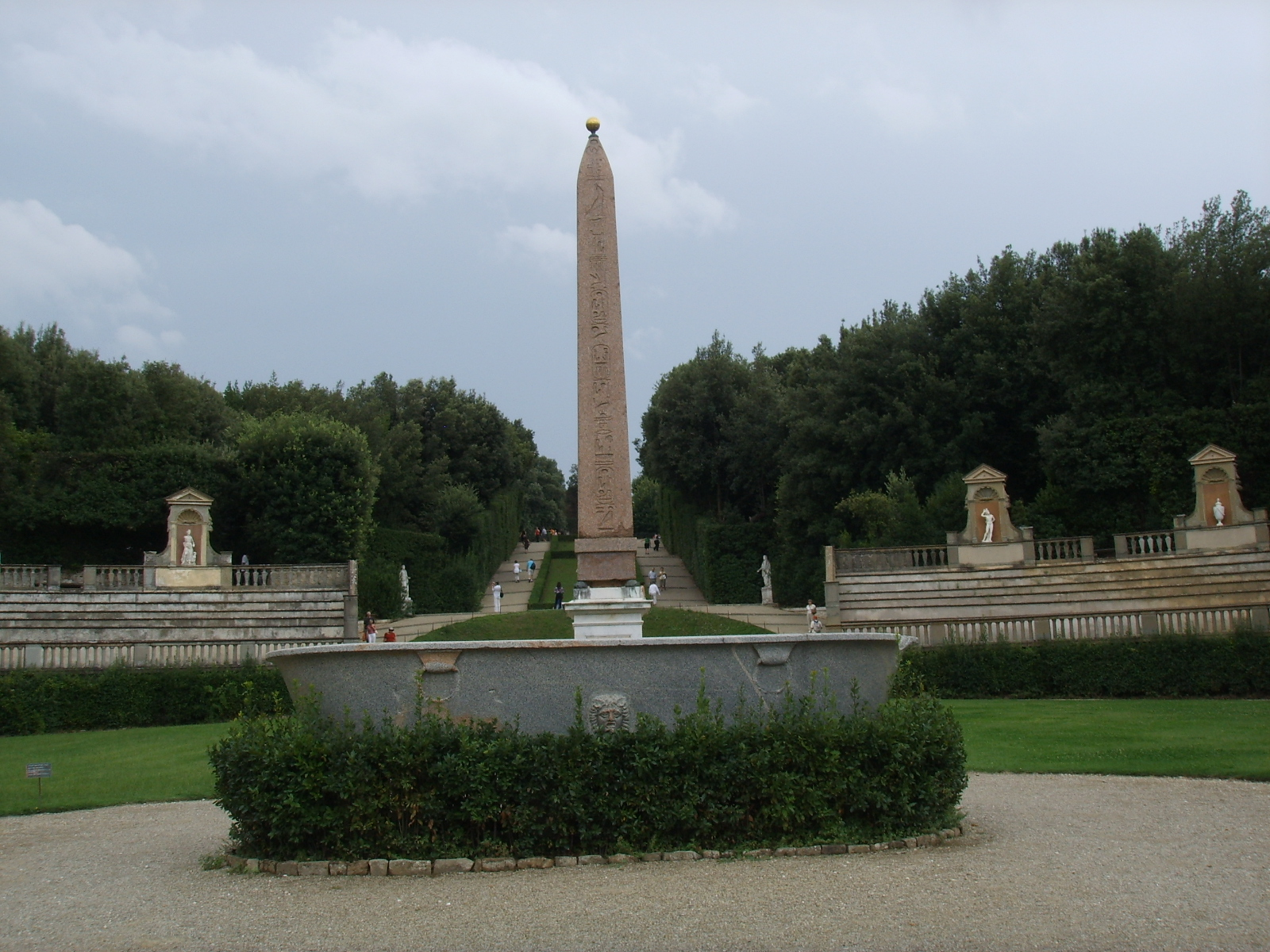 Boboli, obelisco